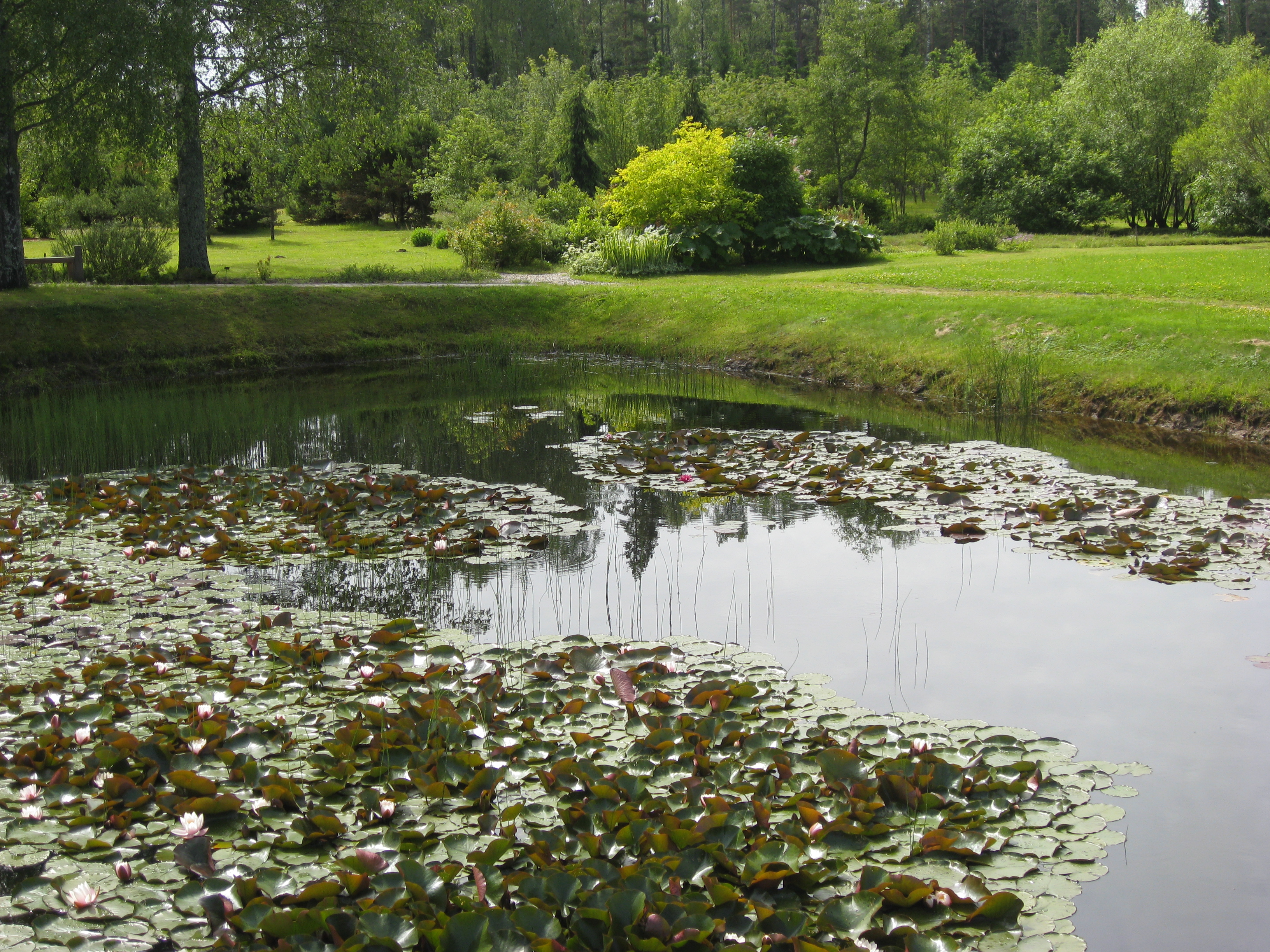 ūdens rozes Kalsnavas arborētumā